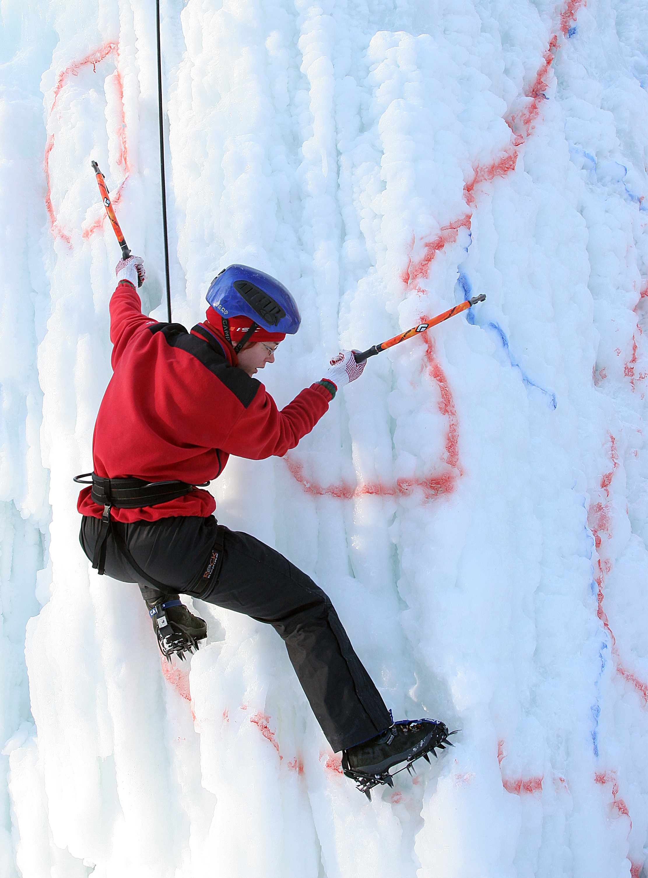 Kristiina Kindel